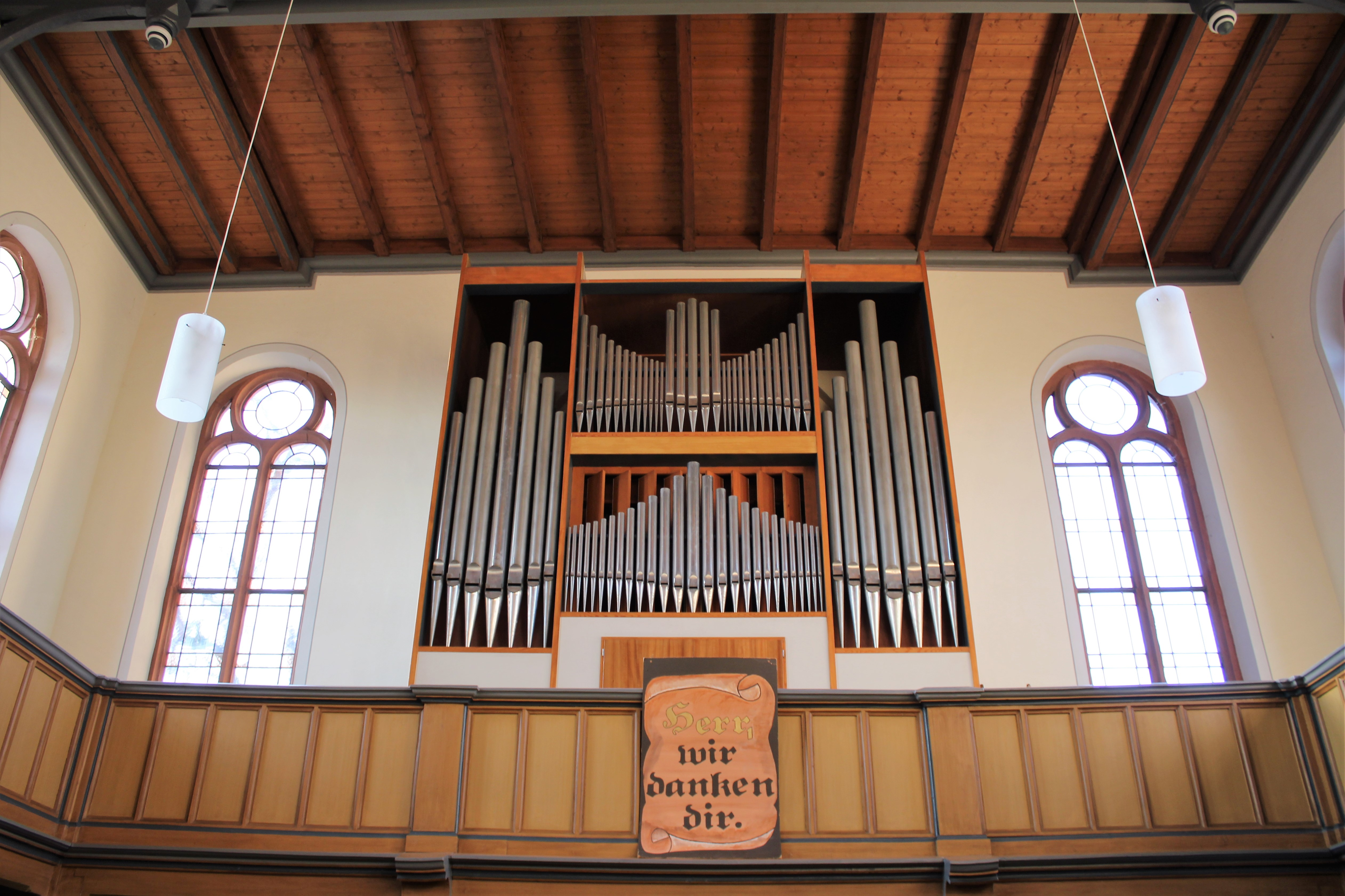 Evangelische Kirche Biskirchen, Gemeinde Leun, Lahn-Dill-Kreis, Hessen, Deutschland